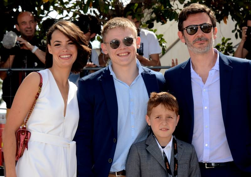 L'équipe du film "The Search" au festival de Cannes